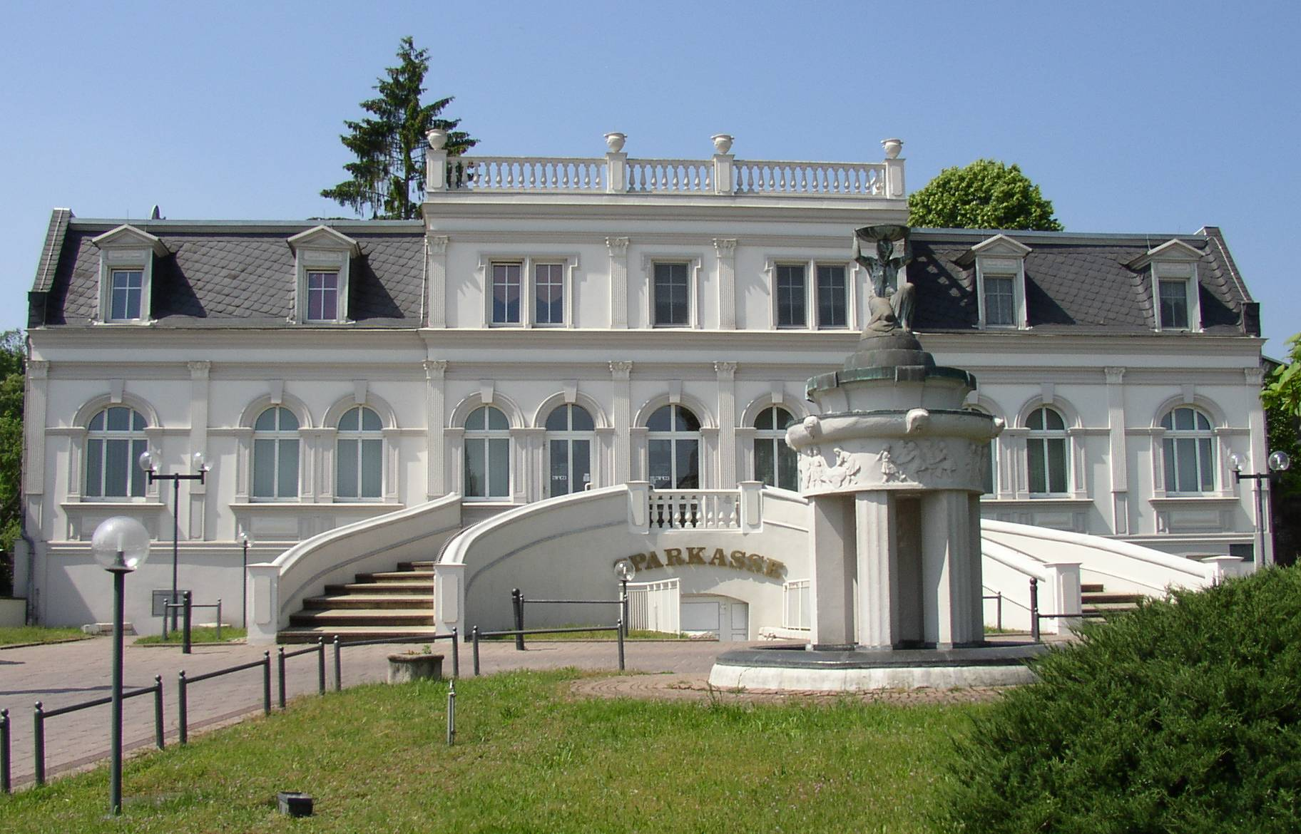 Sparkasse in Wriezen in Brandenburg, Deutschland (Frankfurter Str.; Info-Tafel, gestiftet durch den Verein „Pro Wriezen e. V.“, besagt: „Dieses Gebäude wurde ab 1781 von dem Kgl. Kammerrat Noeldechen (1746-1808), der es erbauen ließ, bewohnt. Von 1807 bis 1809 wohnte hier ein französischer General namens Dumerc. Seit 1922 war in diesem Hause der Sitz der Kreisbank und Kreissparkasse Oberbarnim.“)